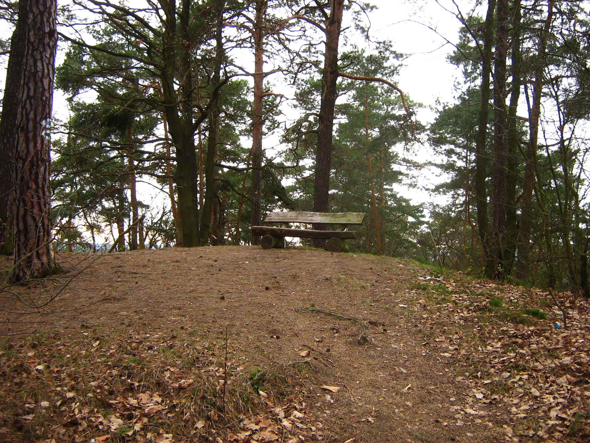 Gipfel des Kleinen Ravensberges in Potsdam (114,2 m NN).